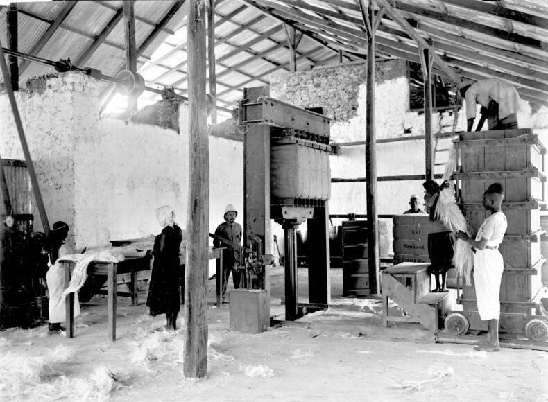 Pressen des Sisals in Ballen